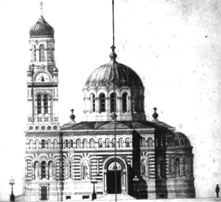 Cerkiew prawosławna Aleksandra Newskiego